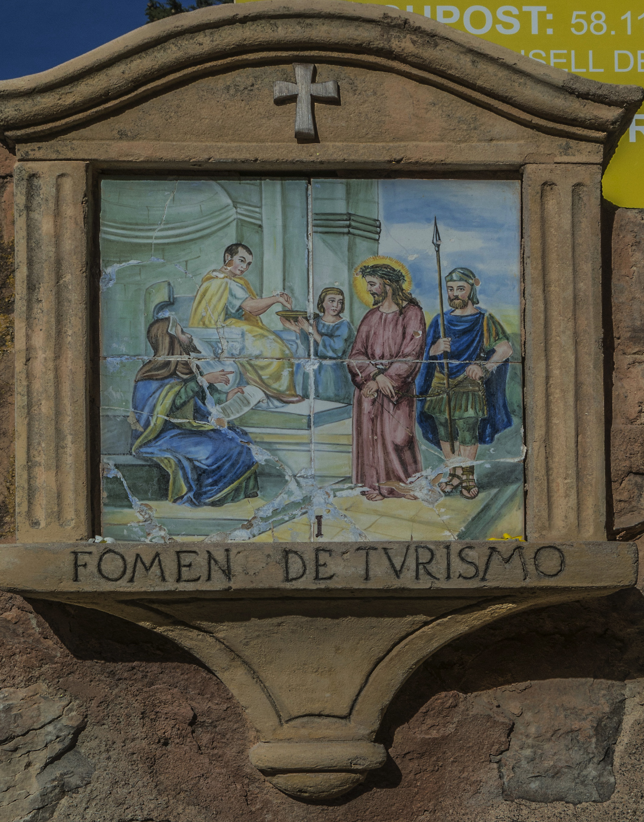 Deià és una vila i municipi de la Serra de Tramuntana de Mallorca. Limita amb els municipis de Valldemossa, Sóller i Bunyola.